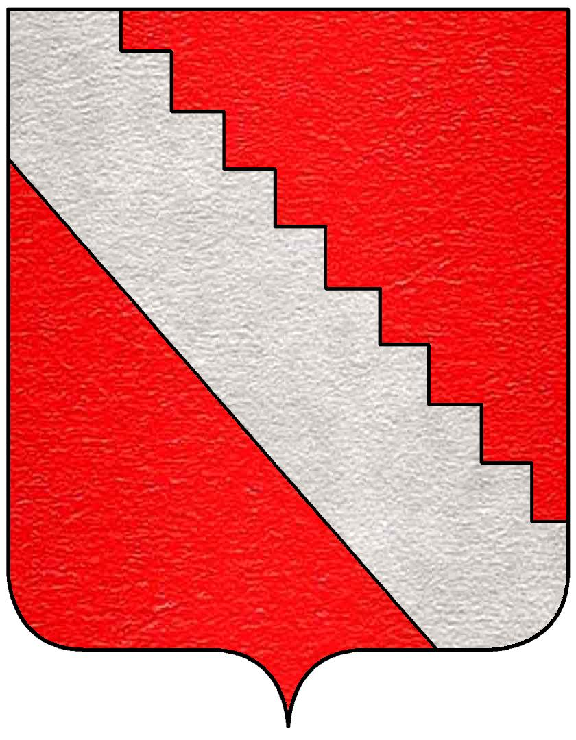 Stemma della famiglia Gradi